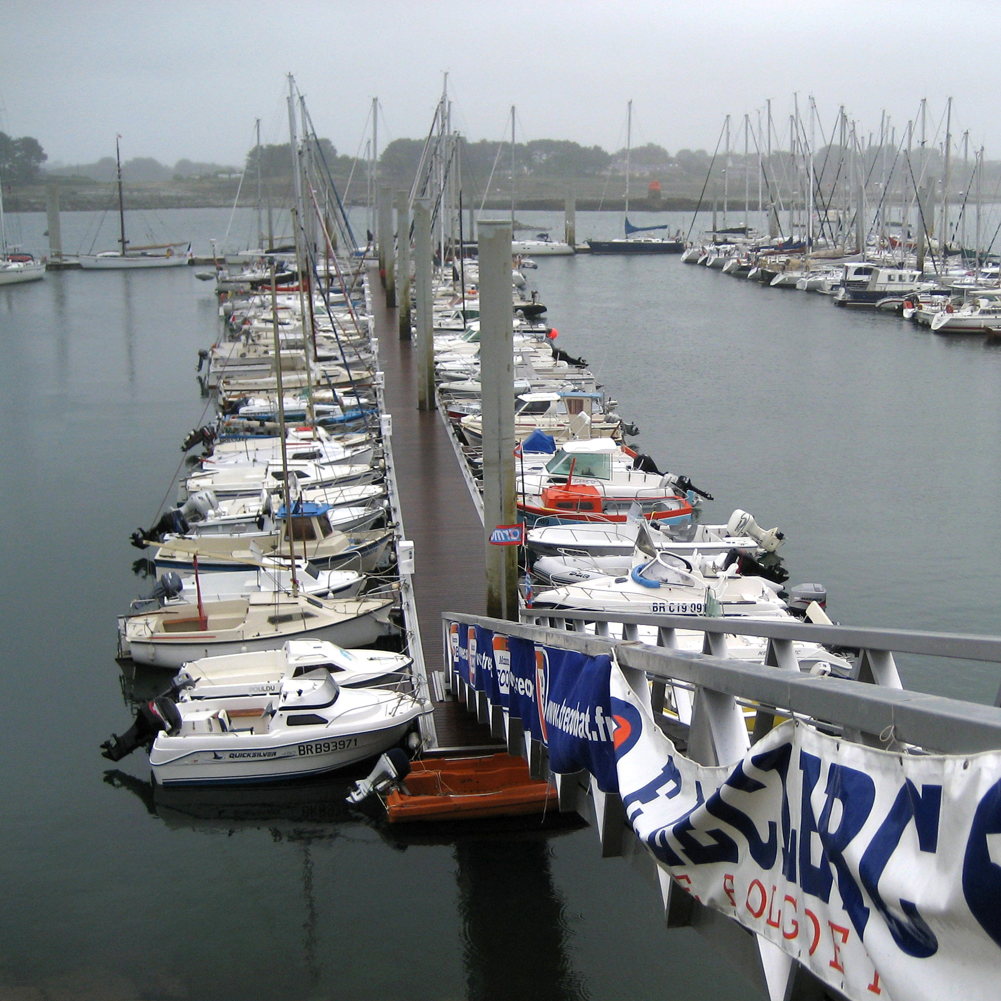 A floating pier or landing stage. (German: Schwimmsteg, Gezeiten, Ebbe, L'Aberwrac'h)